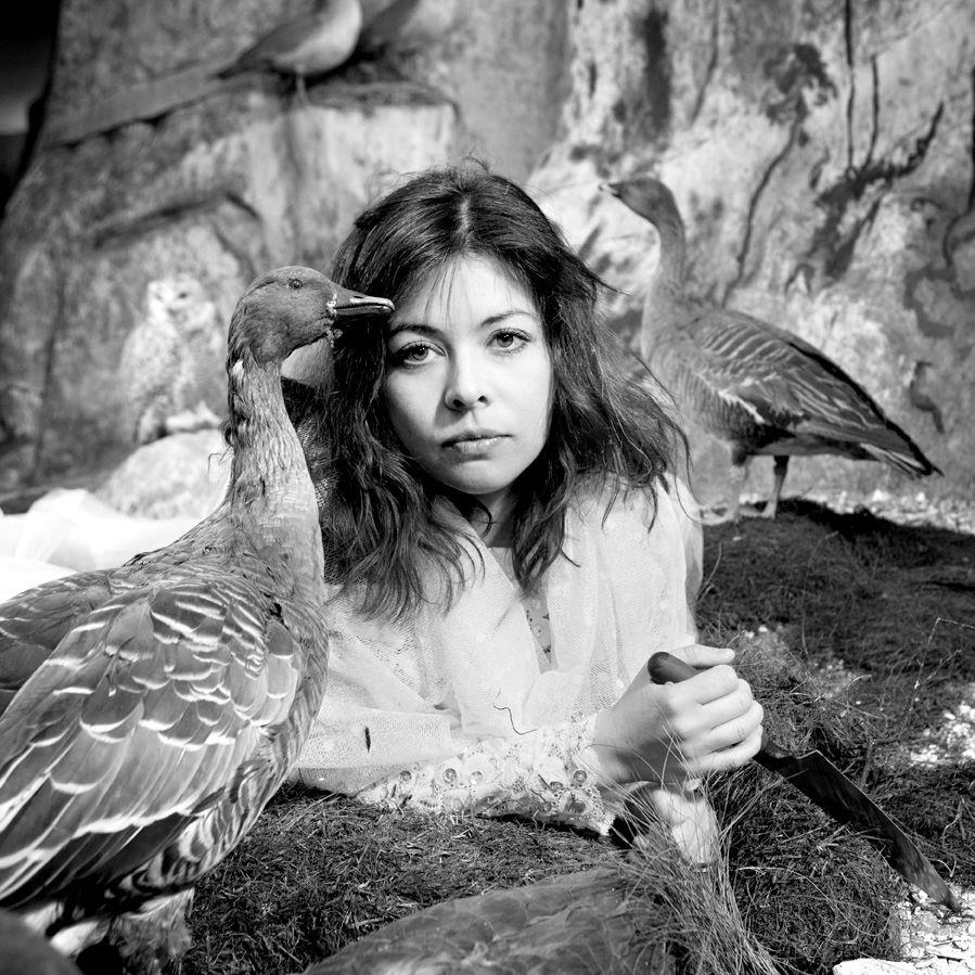 till avgångspjäsen Naturen eller in between på Stdh 2013